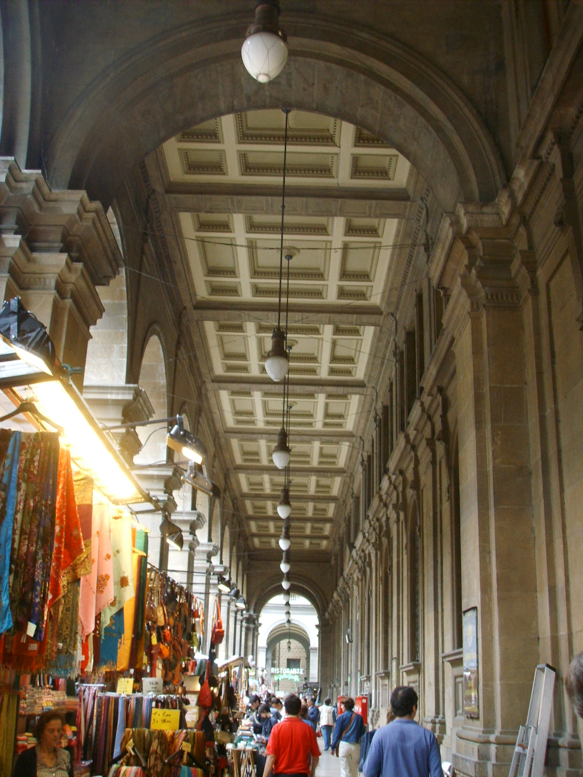 Palazzo delle poste (Firenze), portico